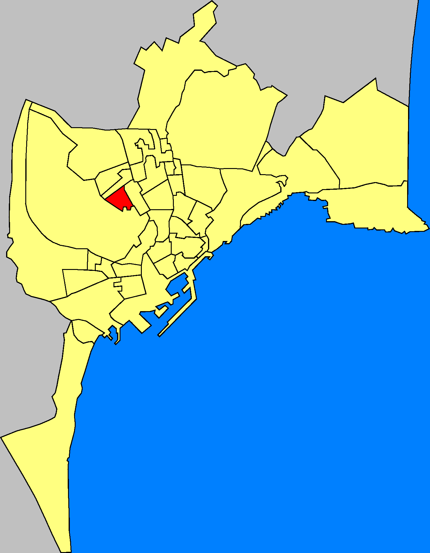 Barri de Sant Agustí en Alacant